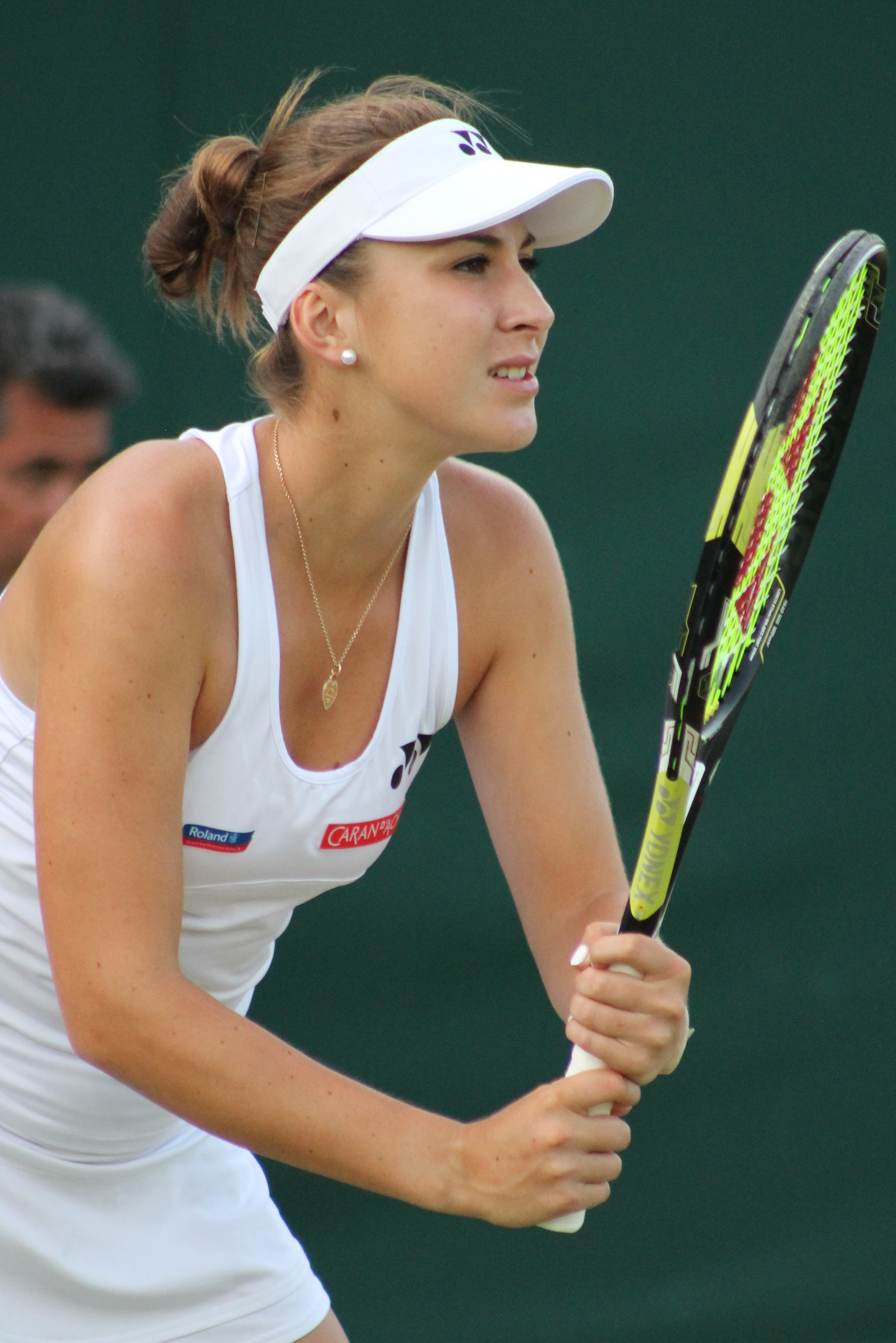 Bencic WM15 (6)